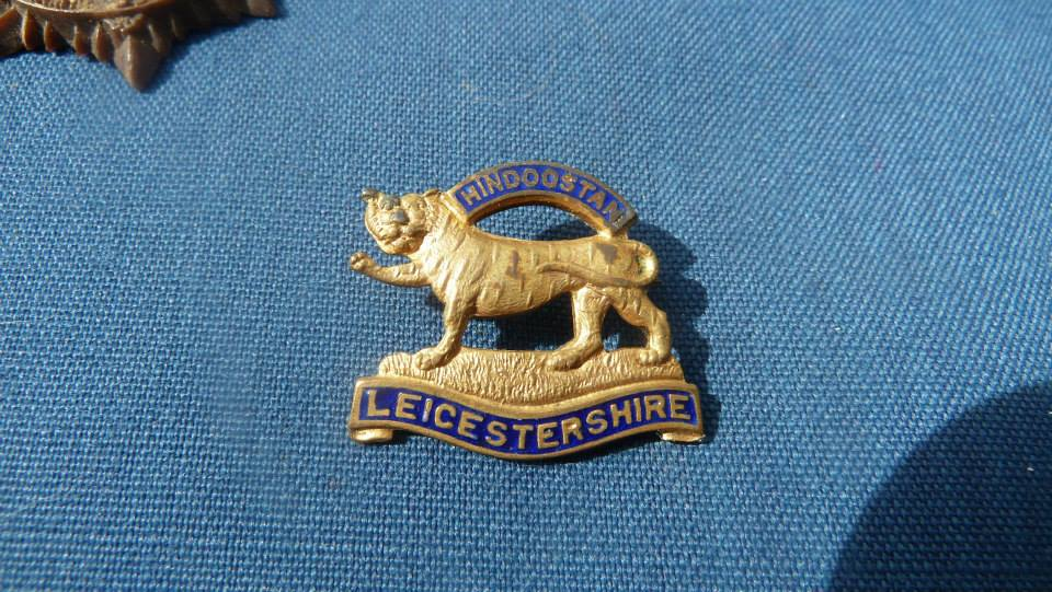 Cap badge gevonden in een blikken doos behorende aan mijn vader. Alle Cad badges horen bij de familie Byrne.